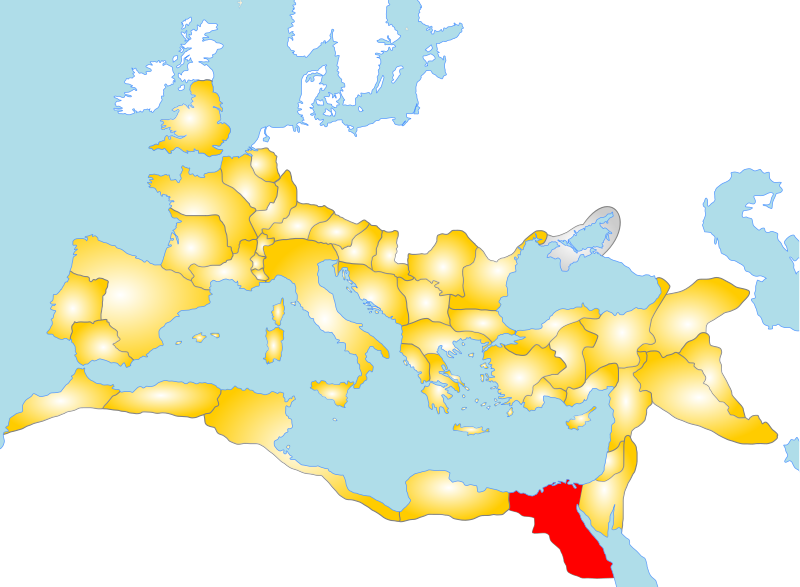 Карта на Римската империя с провинция Египет